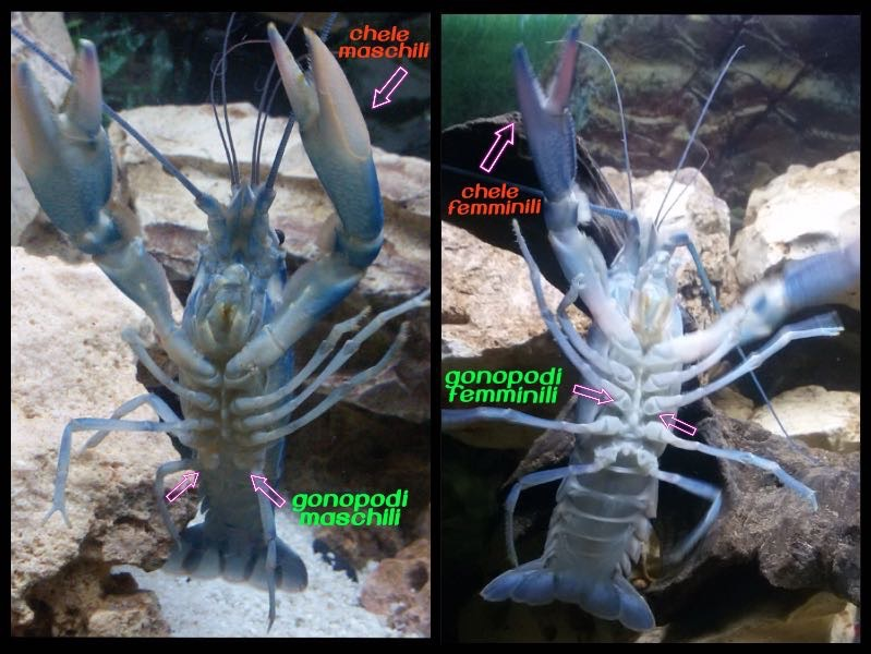 Notte e cometa di pancia